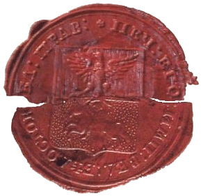 Pieczęć Obwodu Białostockiego, będąca równocześnie herbem Białegostoku w latach 1809-1845.